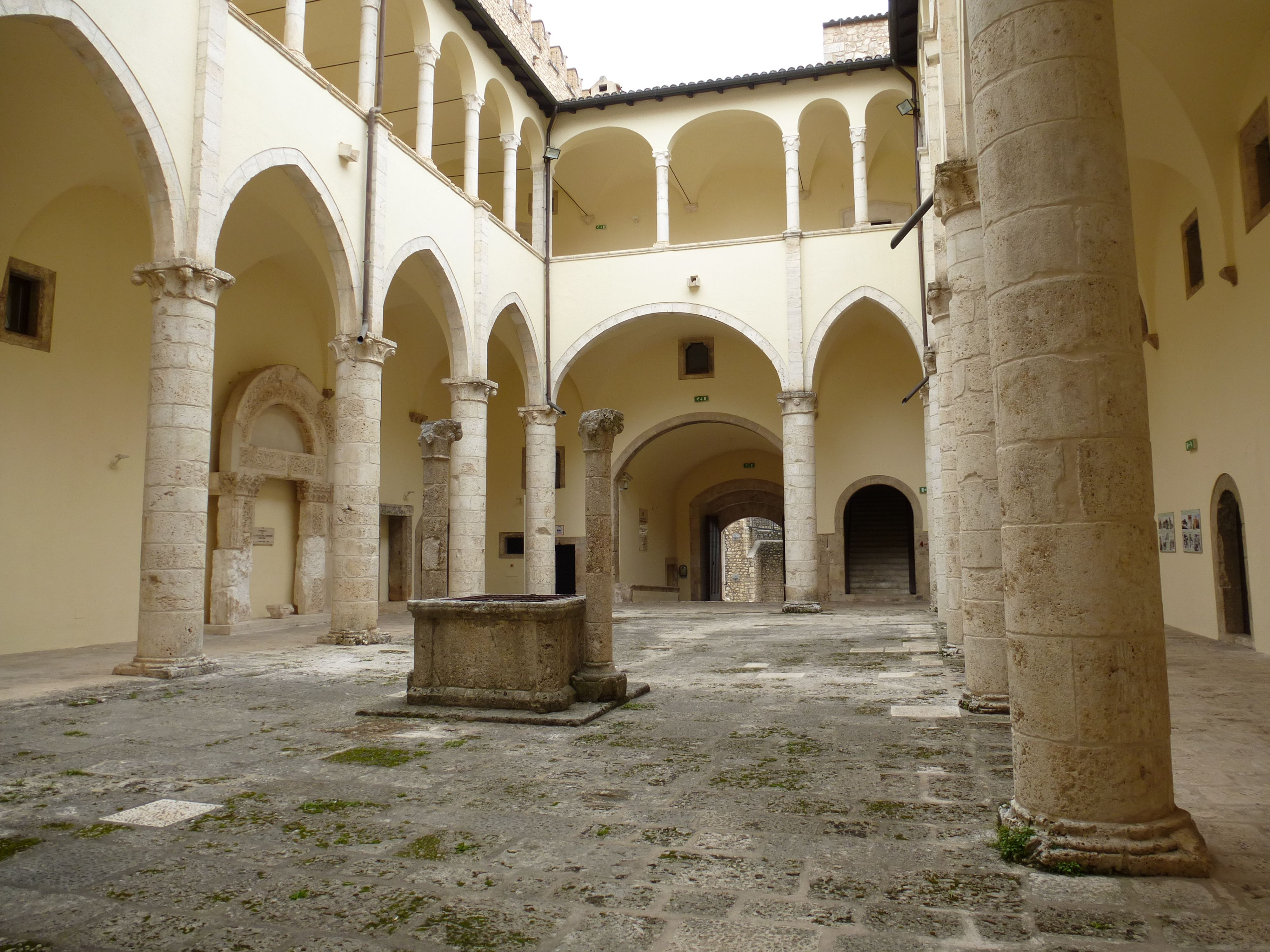 Castello Piccolomini di Celano: Innenhof